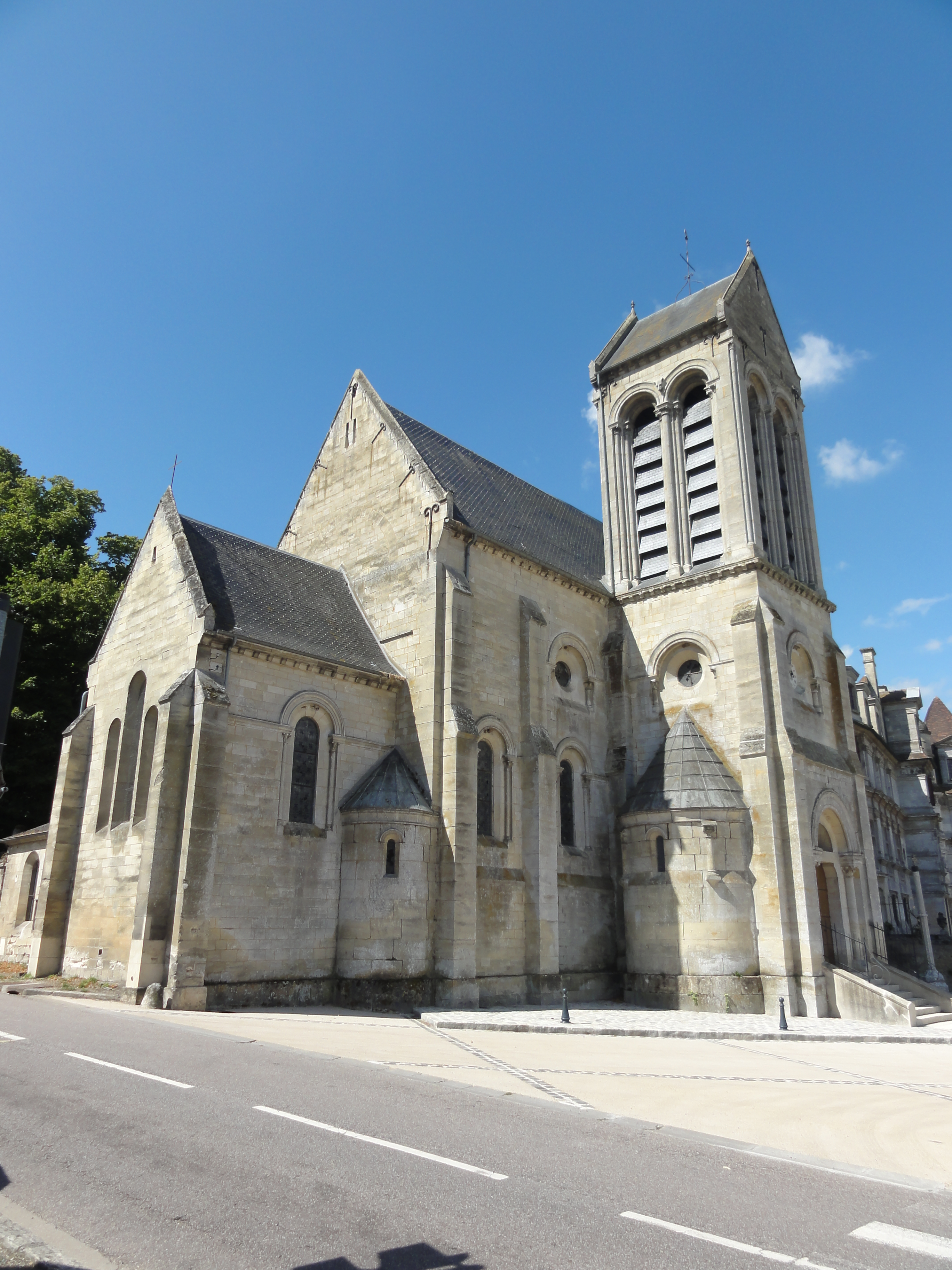 Vue depuis le nord-est.